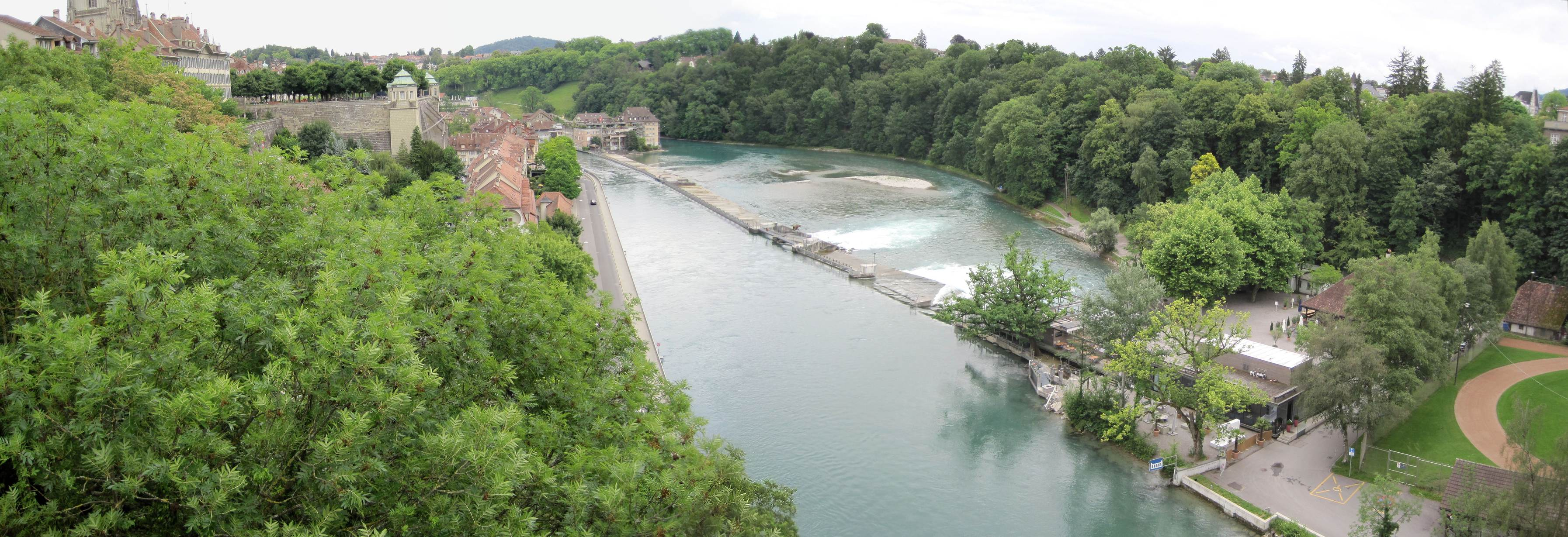 Blick (von links) auf das Mattequartier, den Zufluss zum Wasserkraftwerk Matte, die Matteschwelle (Aareschwelle) und den Aare-Überlauf.